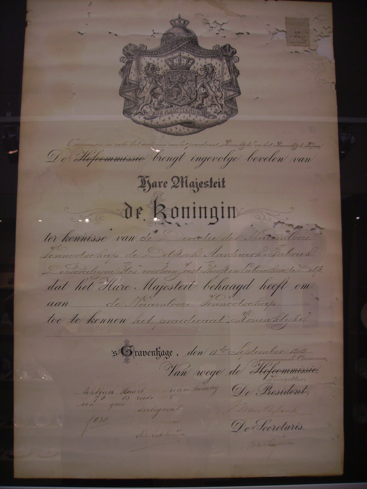 Königliche Verleihungsurkunde. De Porceleyne Fles (vollständig De Koninklijke Delftsche Aardewerkfabriek „De Porceleyne Fles Anno 1653“ N.V., dt. wörtl. Die Königliche Porzellanflasche, engl. bekannt als Royal Delft) ist eine Delfter Porzellanmanufaktur mit einem Porzellanmuseum. Die 1653 gegründete Manufaktur ist ursprünglich für ihre als Delfter Blau oder Delfter Ware bezeichneten Fayencen bekannt.